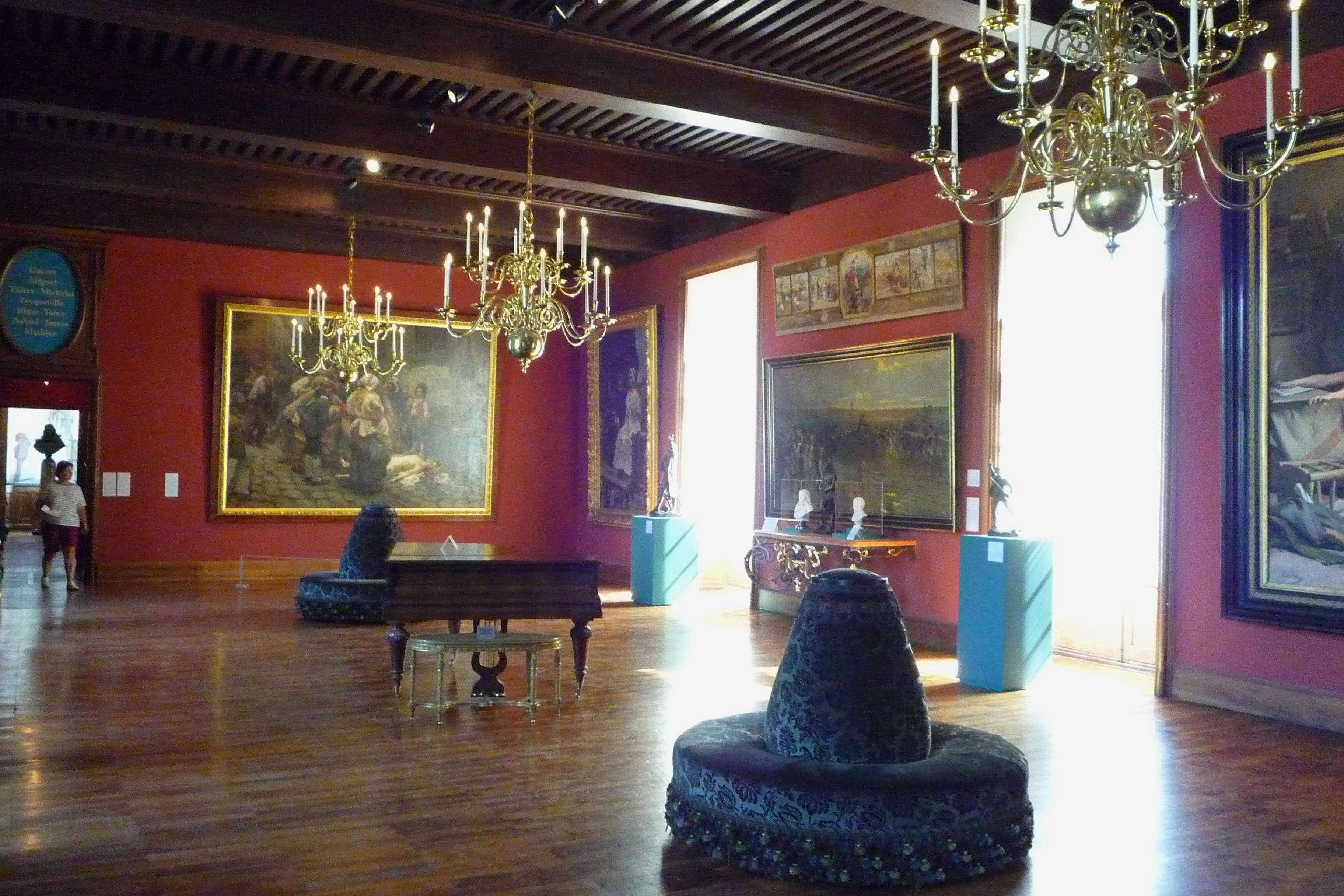 Galerie du XIXe siècle, niveau 3, Musée de la révolution française, Vizille.